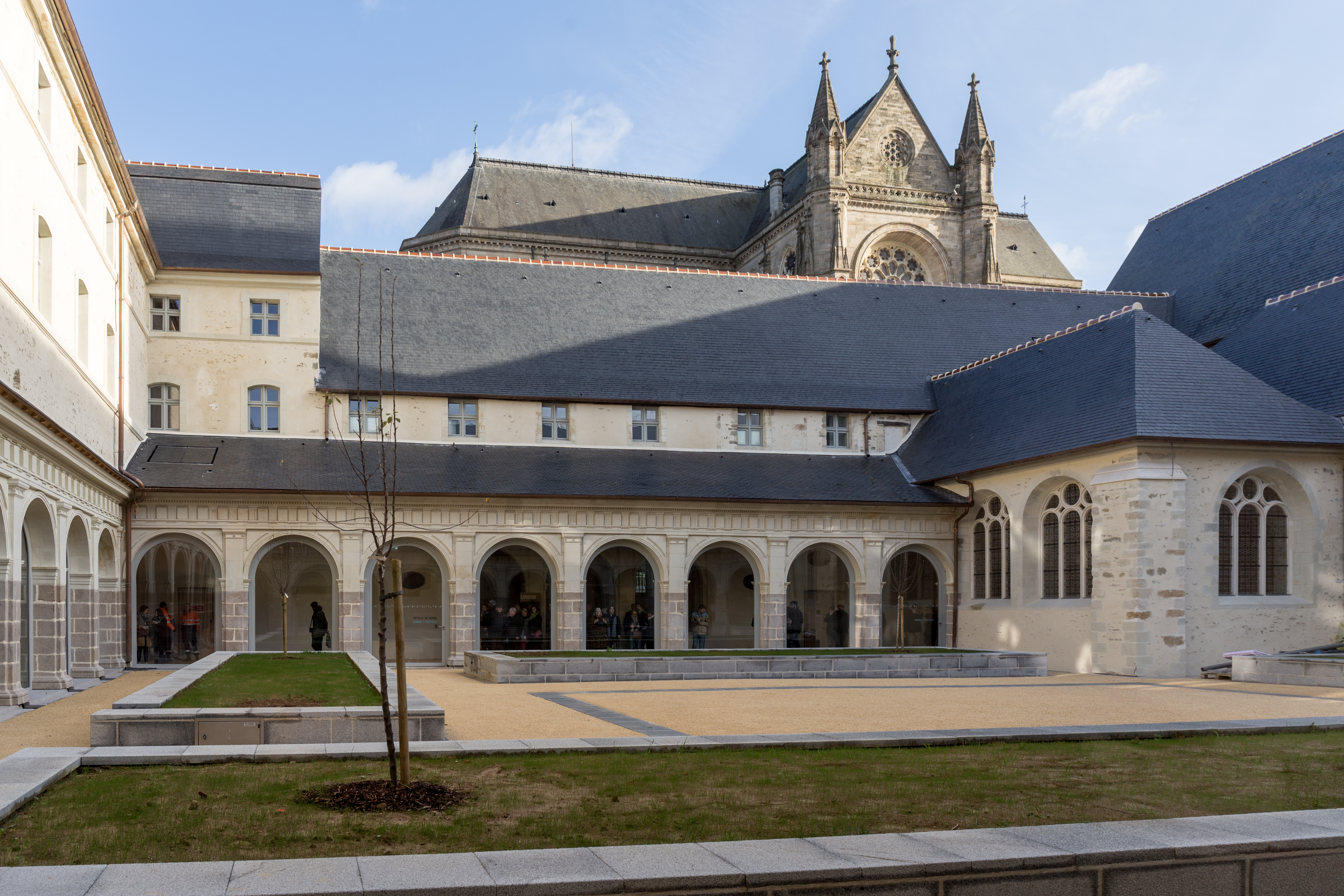 Portes ouvertes du centre des congrès de Rennes « Le Couvent des Jacobins » le 16 décembre 2017.